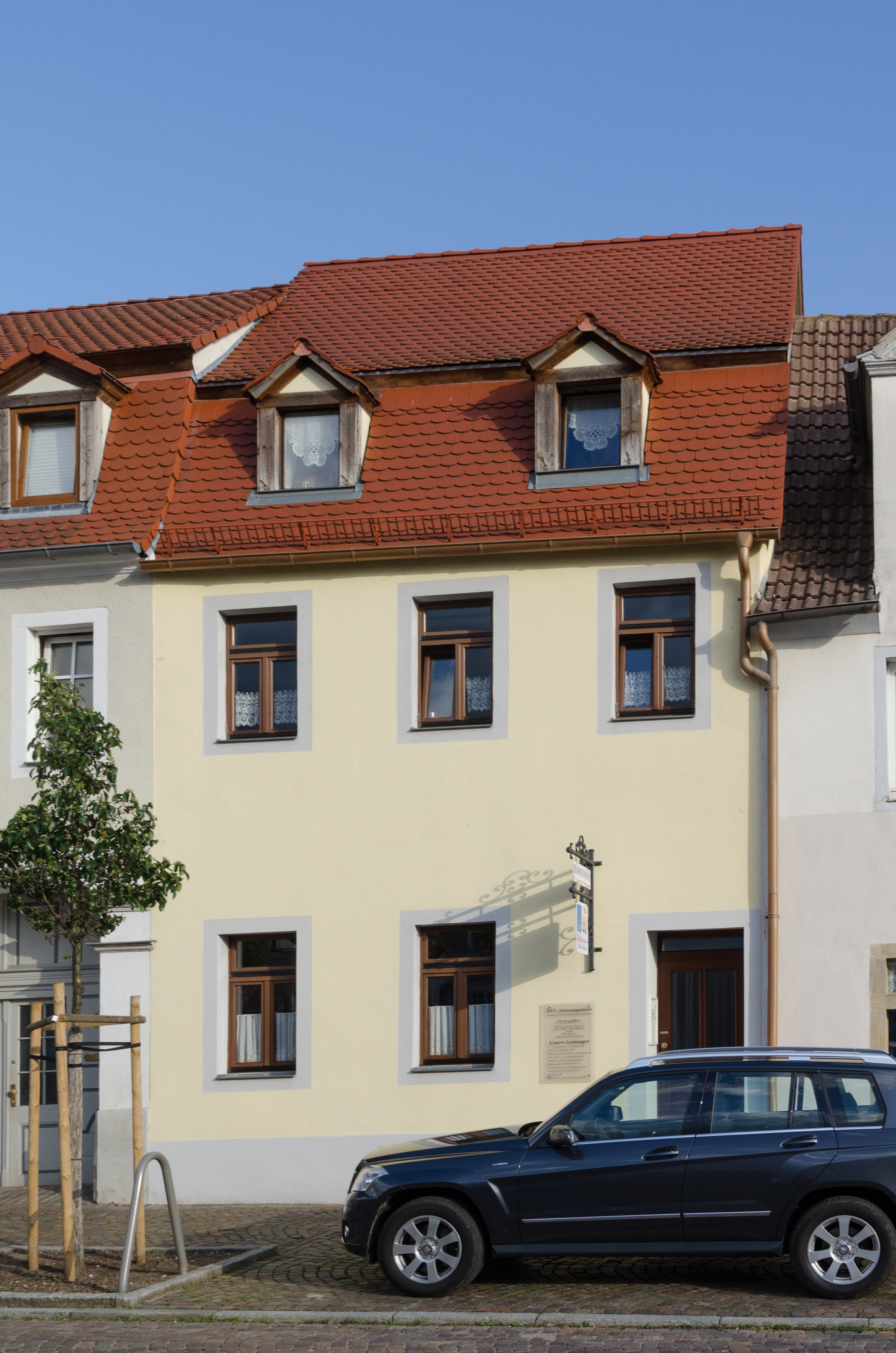 Querfurt, Klippe 8